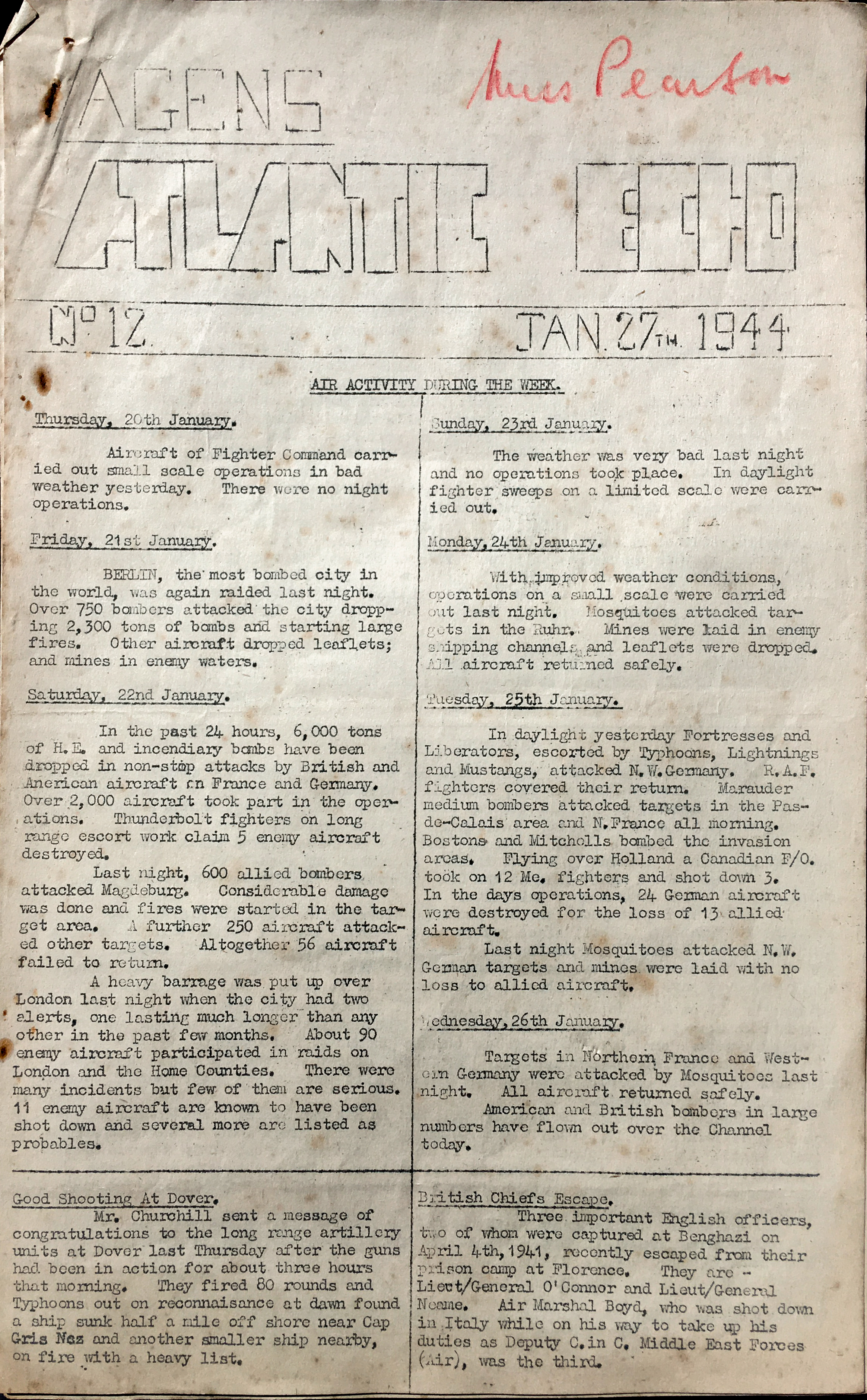 Edição mimeografada do periódico Atlantic Echo, Nº 12 de 27 de Janeiro de 1944.